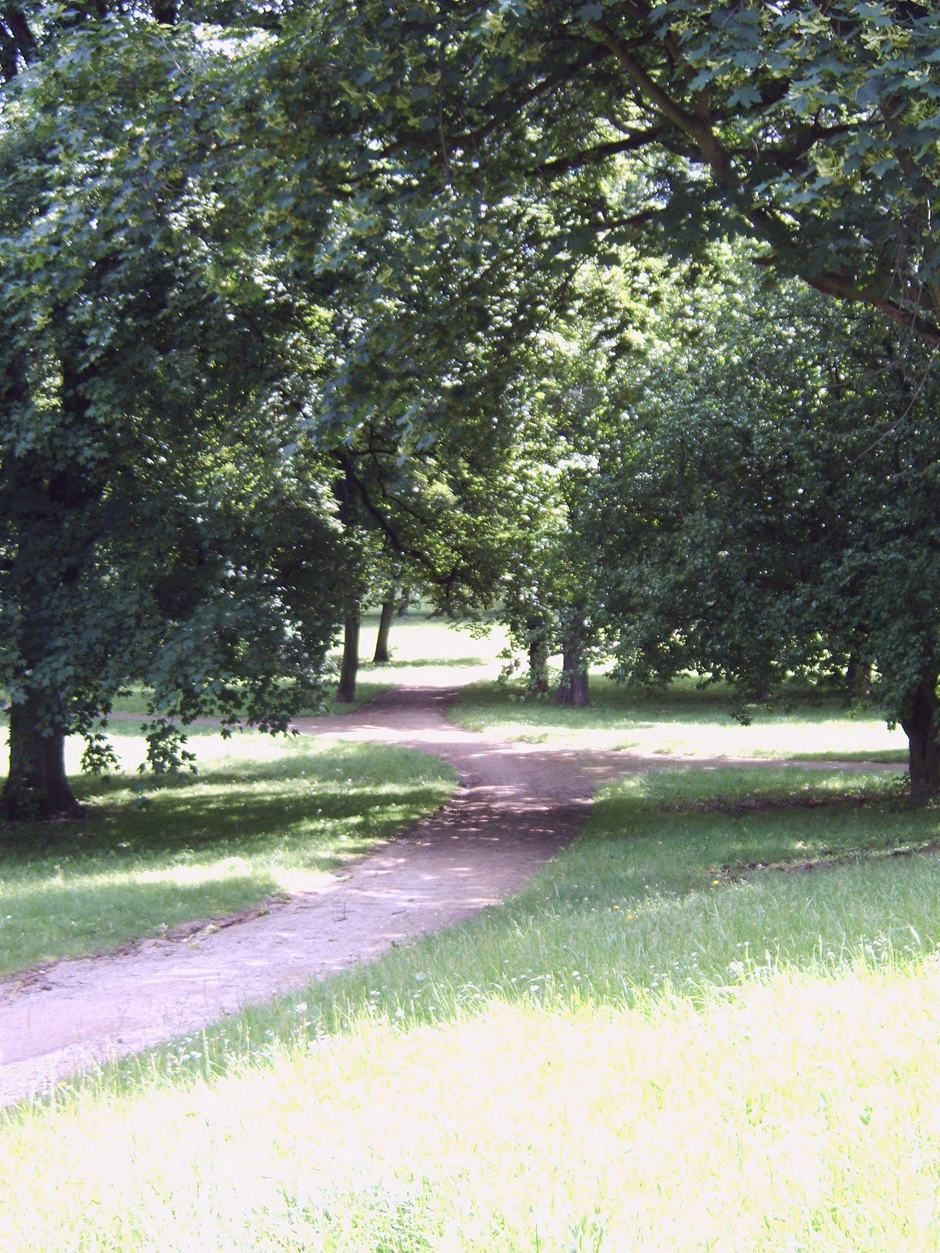 Parkanlage Klosterbergegarten in Magdeburg Bild aufgenommen am 2.6.2006